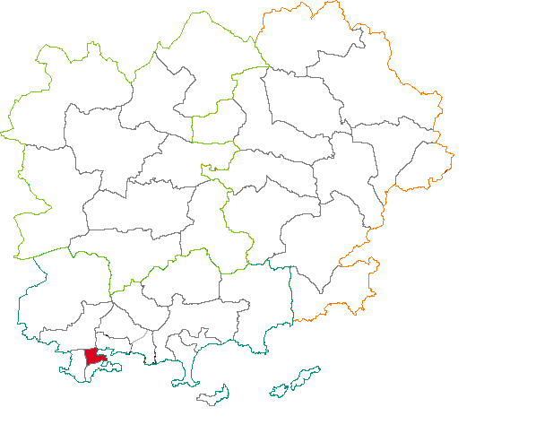 Situation du canton dans le département du Var (83) France